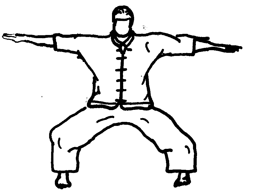 minzinH.jpg